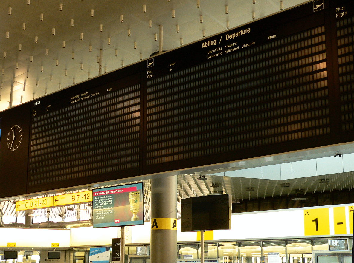 Leere Anzeigetafel auf dem Flughafen Langenhagen infolge des eingestellten Flugverkehrs aufgrund der Corona-Pandemie